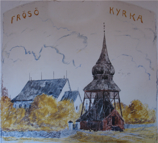 Fresk av Einar Hillberg föreställande Frösö kyrka i Frösön. En av de fresker som Einar Hillberg målade i sin sons, Ove Hillbergs, nybyggda hus i Eskiltuna 1953.